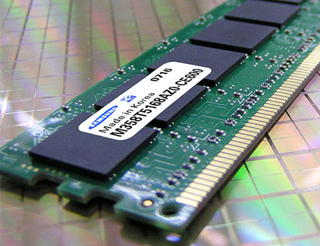 三星電子的DDR2記憶體模組